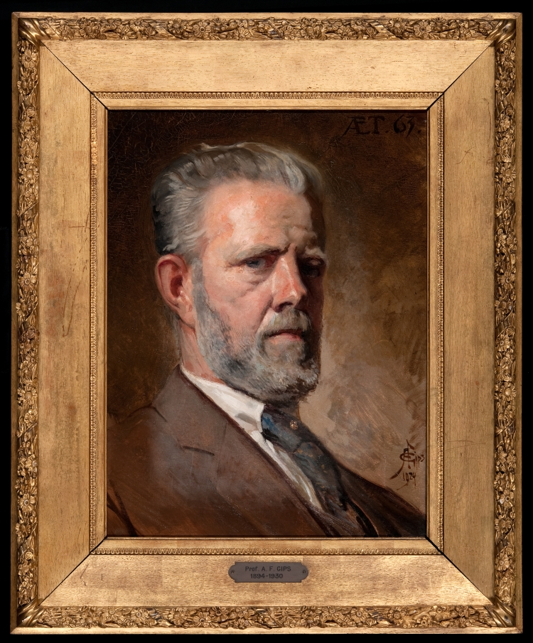 Geschilderd portret van A.F. Gips, hoogleraar handtekenen en geschiedenis der schilder- en beeldhouwkunst (1905-1930); leraar (1894-1905).